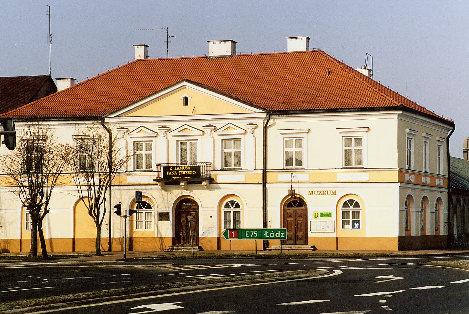 Krośniewice, pl. Wolności 1 - zespół dawnego zajazdu: zajazd, mur., 1803, obecnie Siedziba "Muzeum imienia Jerzego Dunin-Borkowskiego" (zabytek nr 589-III-28 z 16.07.1953; 291/346 z 17.07.1967)